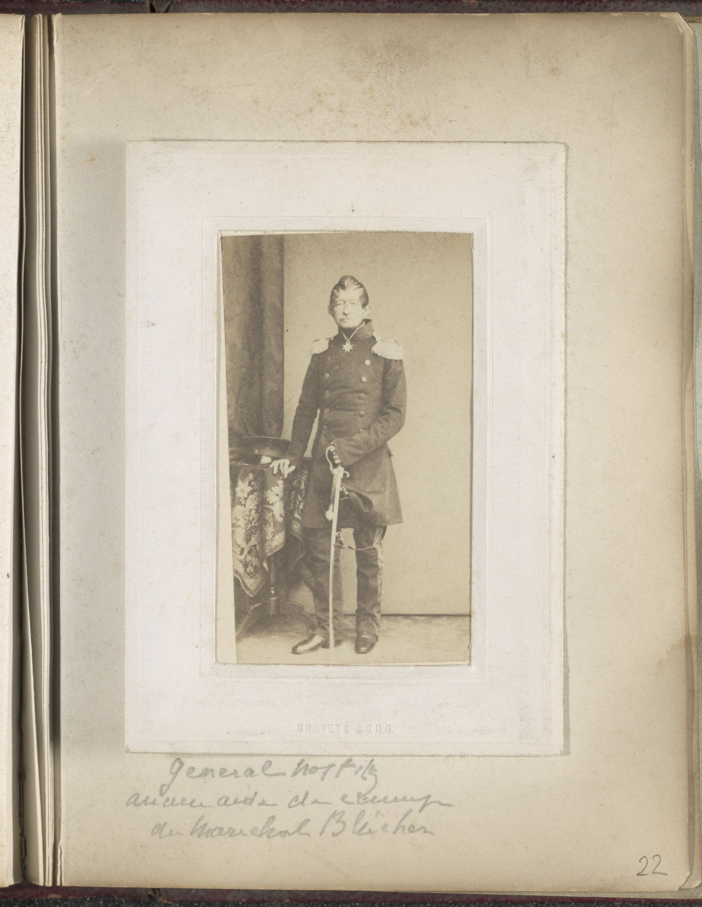 IdentificatieTitel(s): Portret van de Pruisische generaal Von NostitzObjecttype: foto carte-de-visite Objectnummer: RP-F-1999-158-22Opschriften / Merken: naam, recto, handgeschreven: ‘General Nostitz ancien aide de camp du Marechal Blücher’opschrift, verso, handgeschreven: ‘[...] Nostitz ancien aide de camp du M.chal Blücher.’Omschrijving: Onderdeel van Fotoalbum met 48 cartes-de-visite aangeboden aan maarschalk graaf De Castellane.VervaardigingVervaardiger: fotograaf: anoniemDatering: ca. 1860 - ca. 1865Fysieke kenmerken: albuminedrukMateriaal: karton papier fotopapier Techniek: albuminedrukAfmetingen: foto: h 84 mm × b 48 mmkarton: h 98 mm × b 63 mmOnderwerpWat: historical personsstudio requisites ~ photographertrousers, breechescoat, cape(military) uniformshacking and thrusting weapons (with NAME)hairdressveteranmedals and other marks of military honourWie: August Ludwig von NostitzVerwerving en rechtenVerwerving: aankoop 1999Copyright: Publiek domein